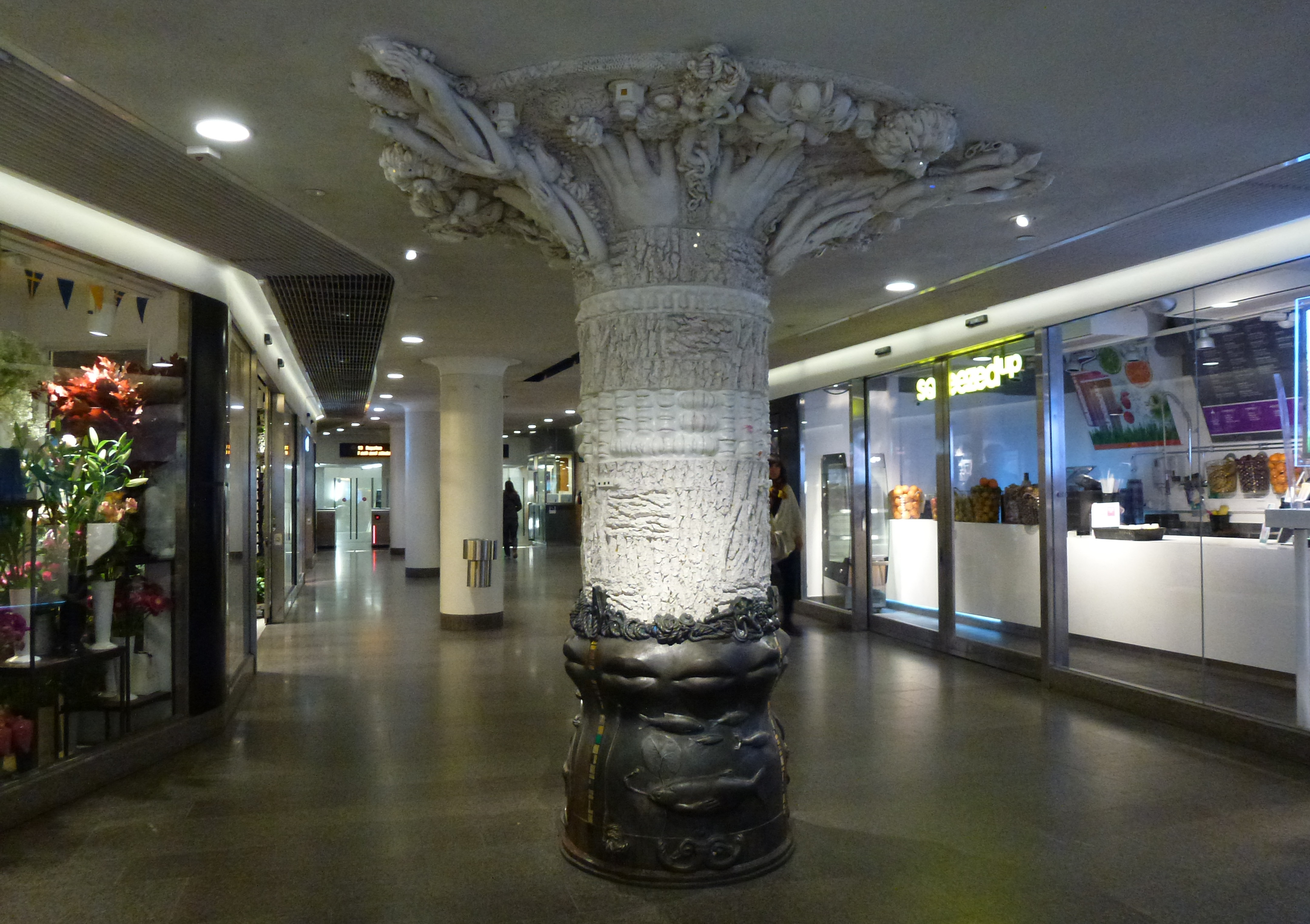 Eva Ziggy Berglunds pelarskulptur "Avtryck" Hornstulls tunnelbana